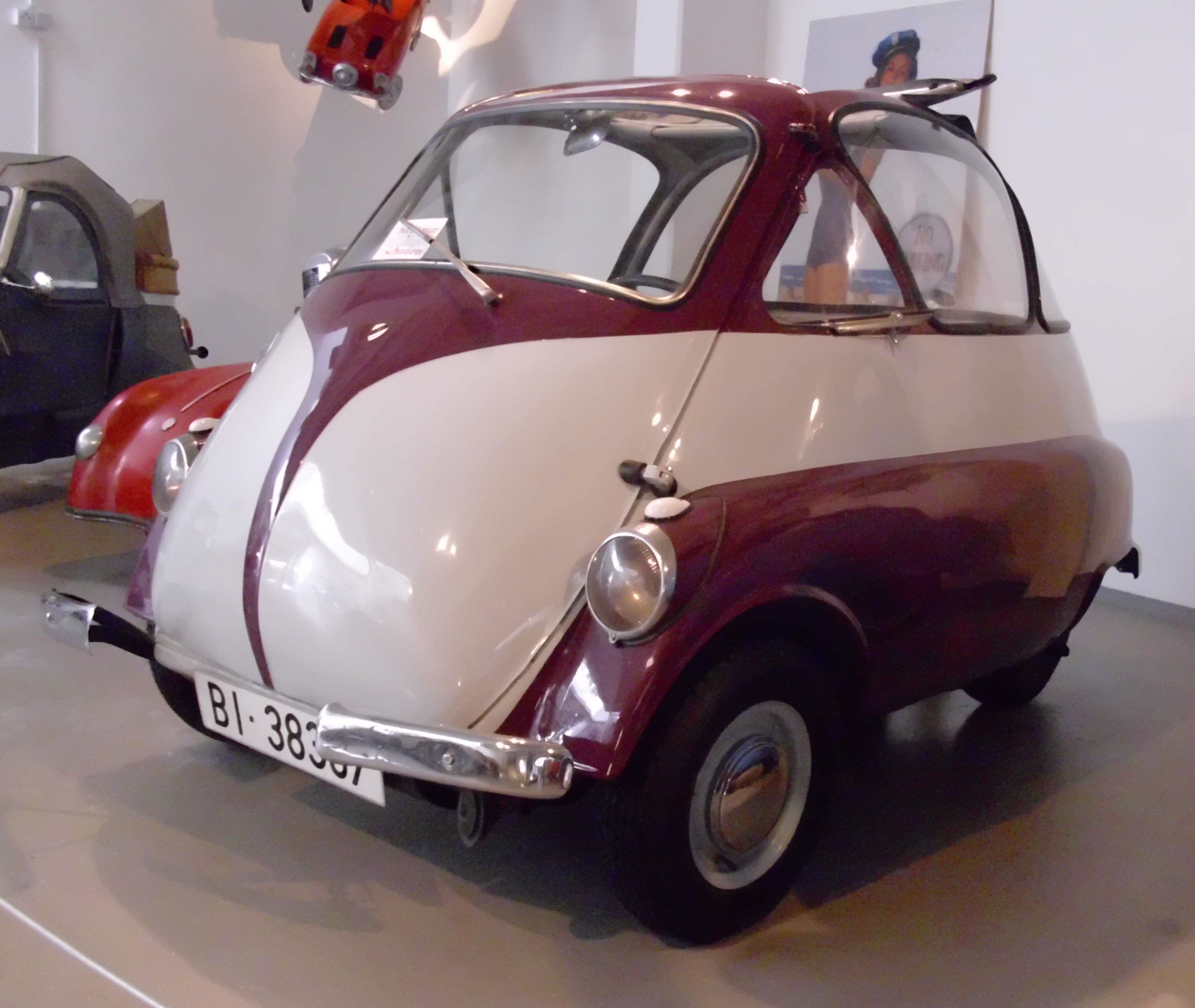 Iso España Isetta 1953–1959 im RRR Roller, Rollermobile & Wurlitzer-Museum in Eggenburg, Österreich